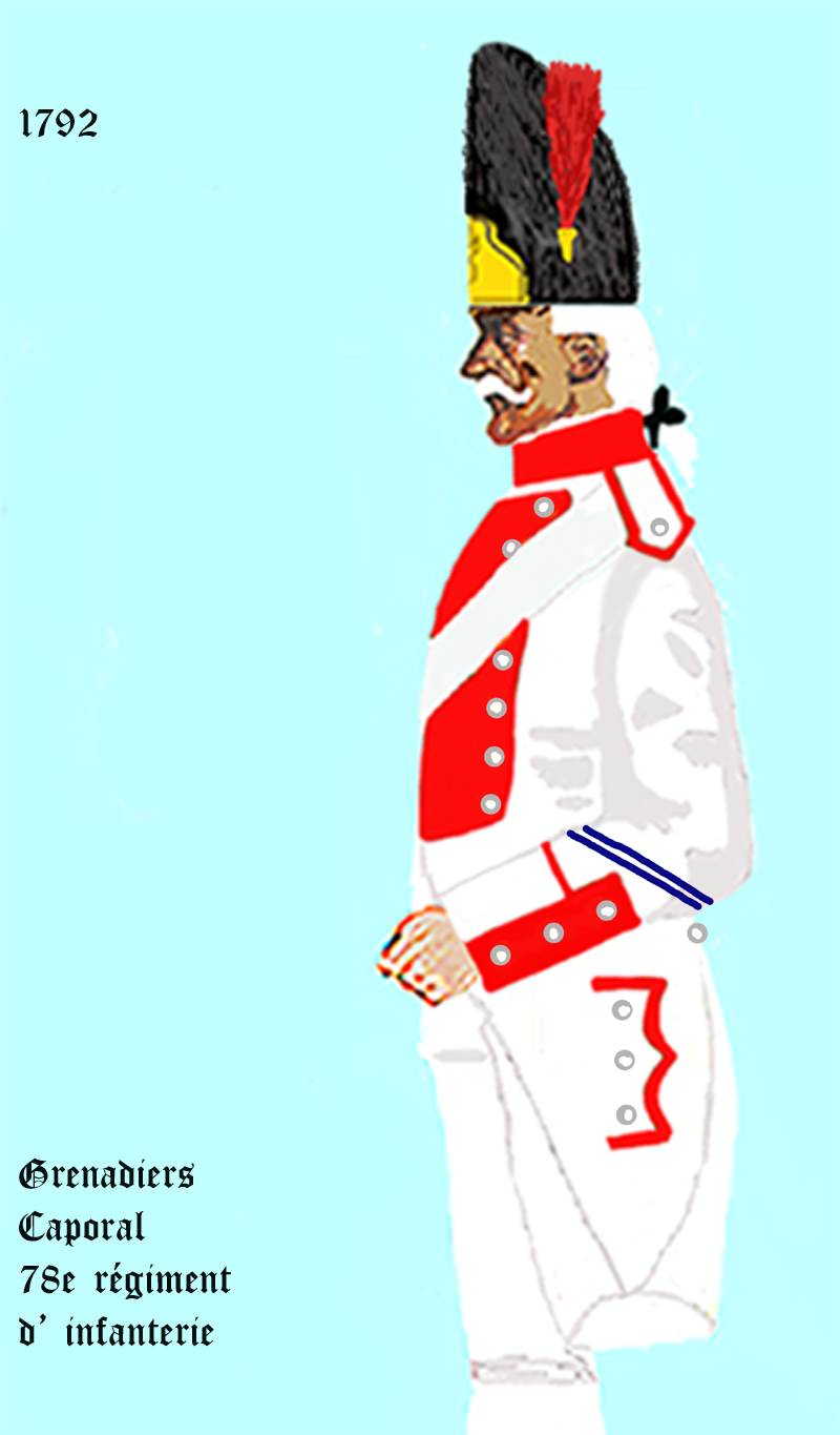 Uniform eines königlich französischen Infanterie-Regiments gemäß Dekret von 1792. - Entnommen und überarbeitet aus: „LES UNIFORMES ET LES DRAPEAUX DE L'ARMÉE DU ROI“ Marseille 1899.